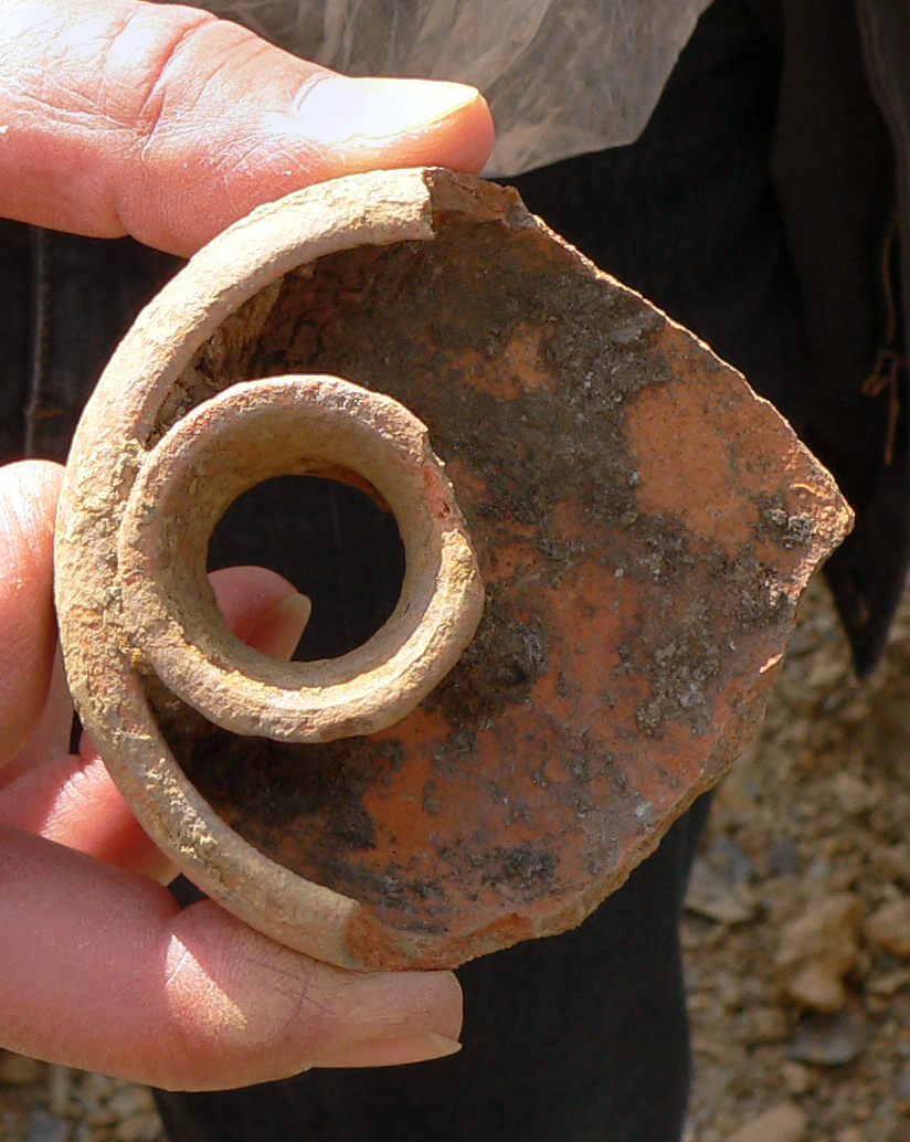 Nachbildung des Fragments einer offenen Froschlampe aus Ton.